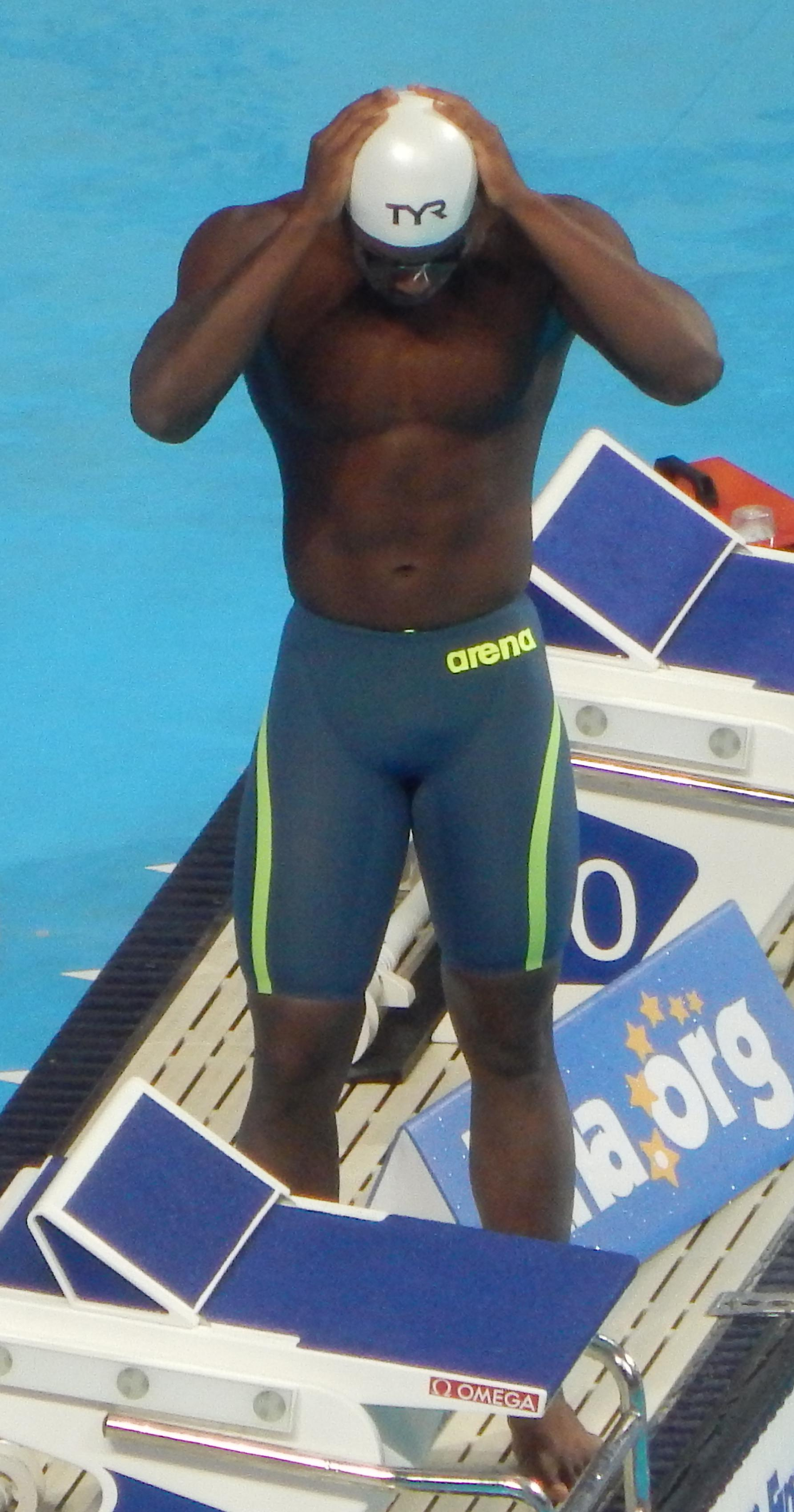 Мехди Метелла на чемпионате мира в Казани